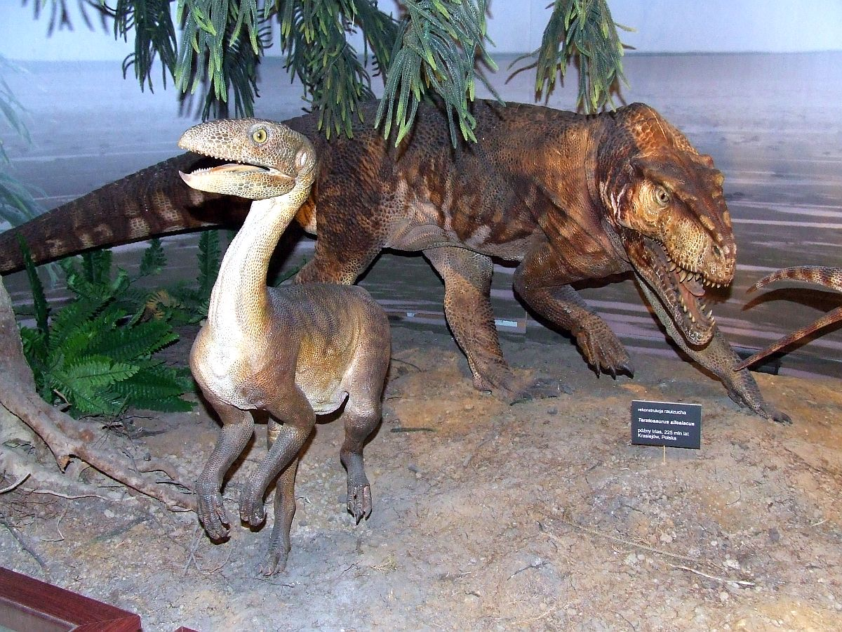 Rauizuch (Polonosuchus silesiacus) and silezaur (Silesaurus opolensis), Muzeum Ewolucji PAN